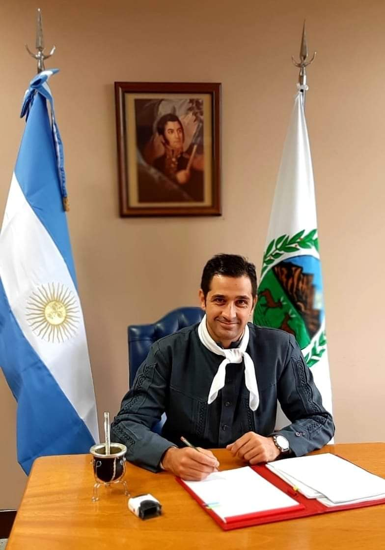 Juan Manuel Rigau en su despacho legislativo. San Luis, 2018